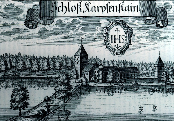 Kupferstich von Michael Wening:ehemaliges Schloss Karpfenstein in Mühlausen bei Neustadt an der Donau um 1700